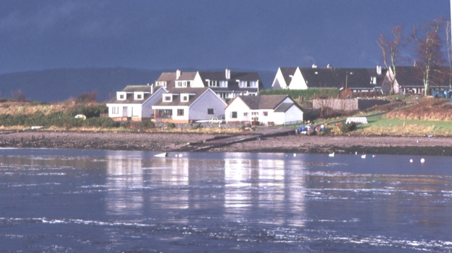 North Connel, Argyll